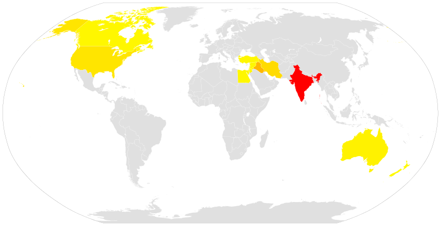 Países con jurisdicciones católicas de tradición litúrgica caldea